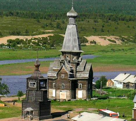 Село Варзуга Varzuga in the Kola Peninsula, Russia